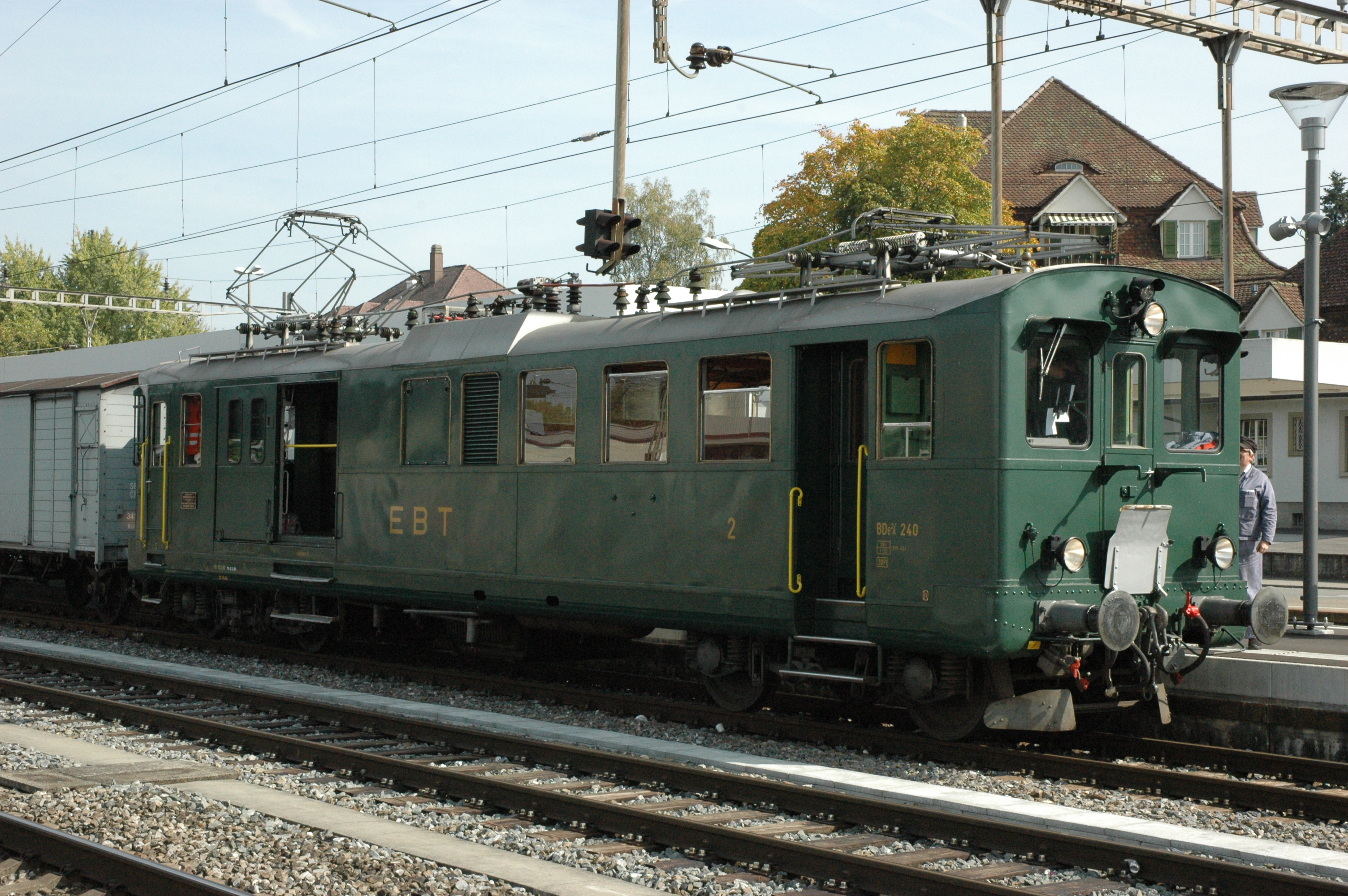 Elektrotriebwagen BDe 2/4 240 des Vereins Historische Eisenbahn Emmental, ex EBT, in Langenthal